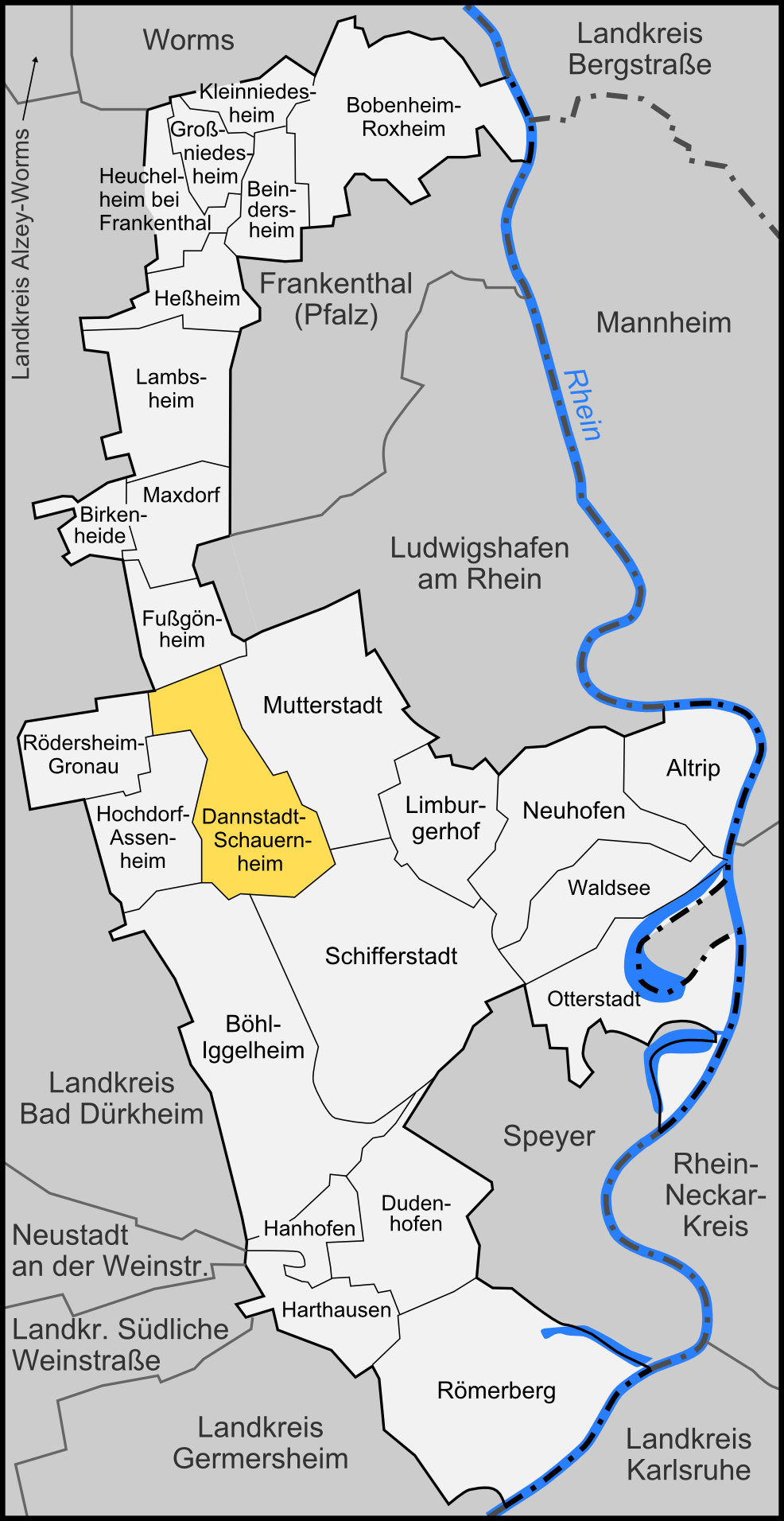 Karte der Gemeinde Dannstadt-Schauernheim im Rhein-Pfalz-Kreis